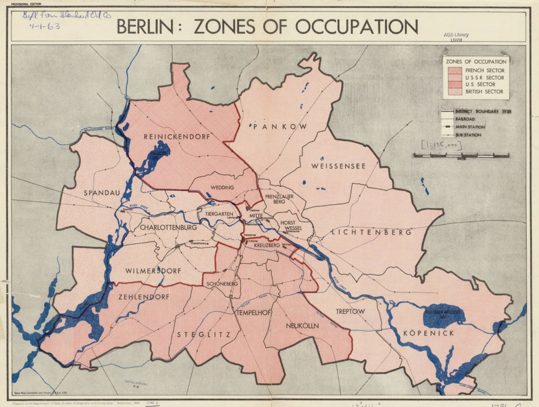 1945 Berlin Zones